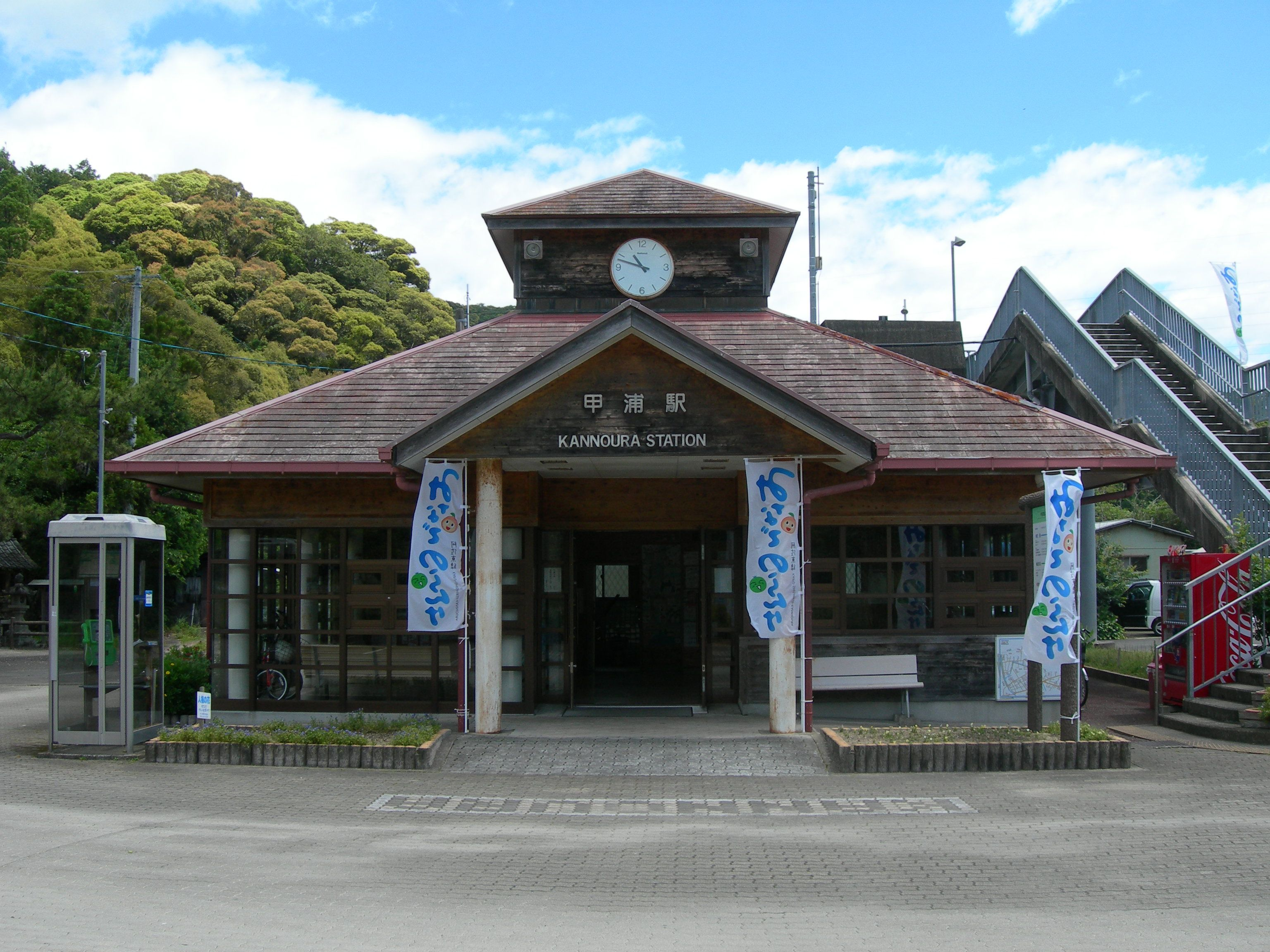 阿佐海岸鉄道・甲浦駅。高知県東洋町。